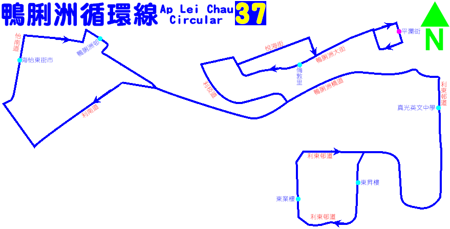 中文（香港）: 港島專線小巴37線及37A線的走線圖，當中37路為順時針走線，而37A則為反時針走線